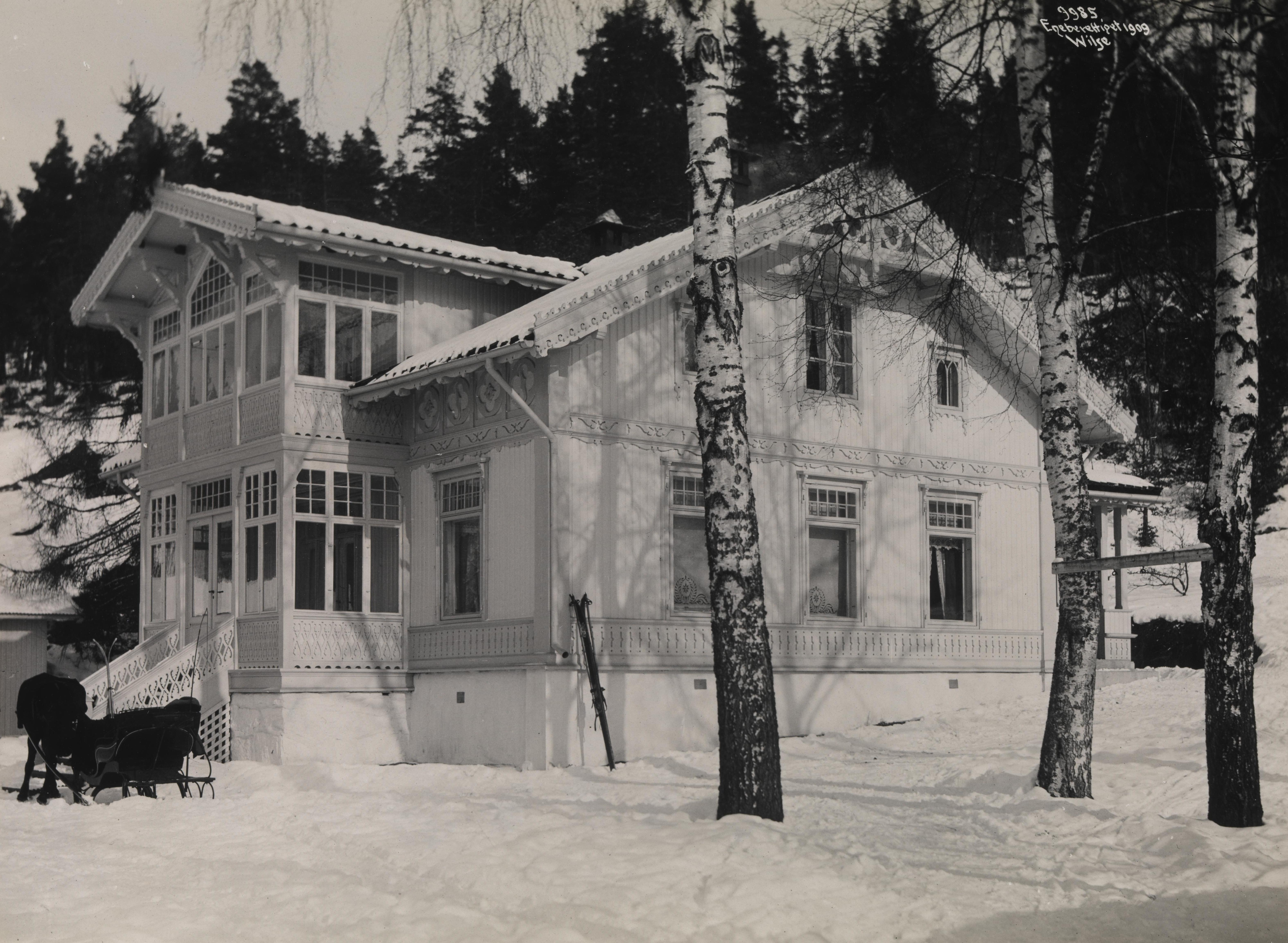 Bildet er hentet fra Nasjonalbibliotekets bildesamling. Anmerkninger til bildet var: Tittel hentet fra Galleri NOR (Wilses protokoll) Svartskog, Oppegård, Akershus